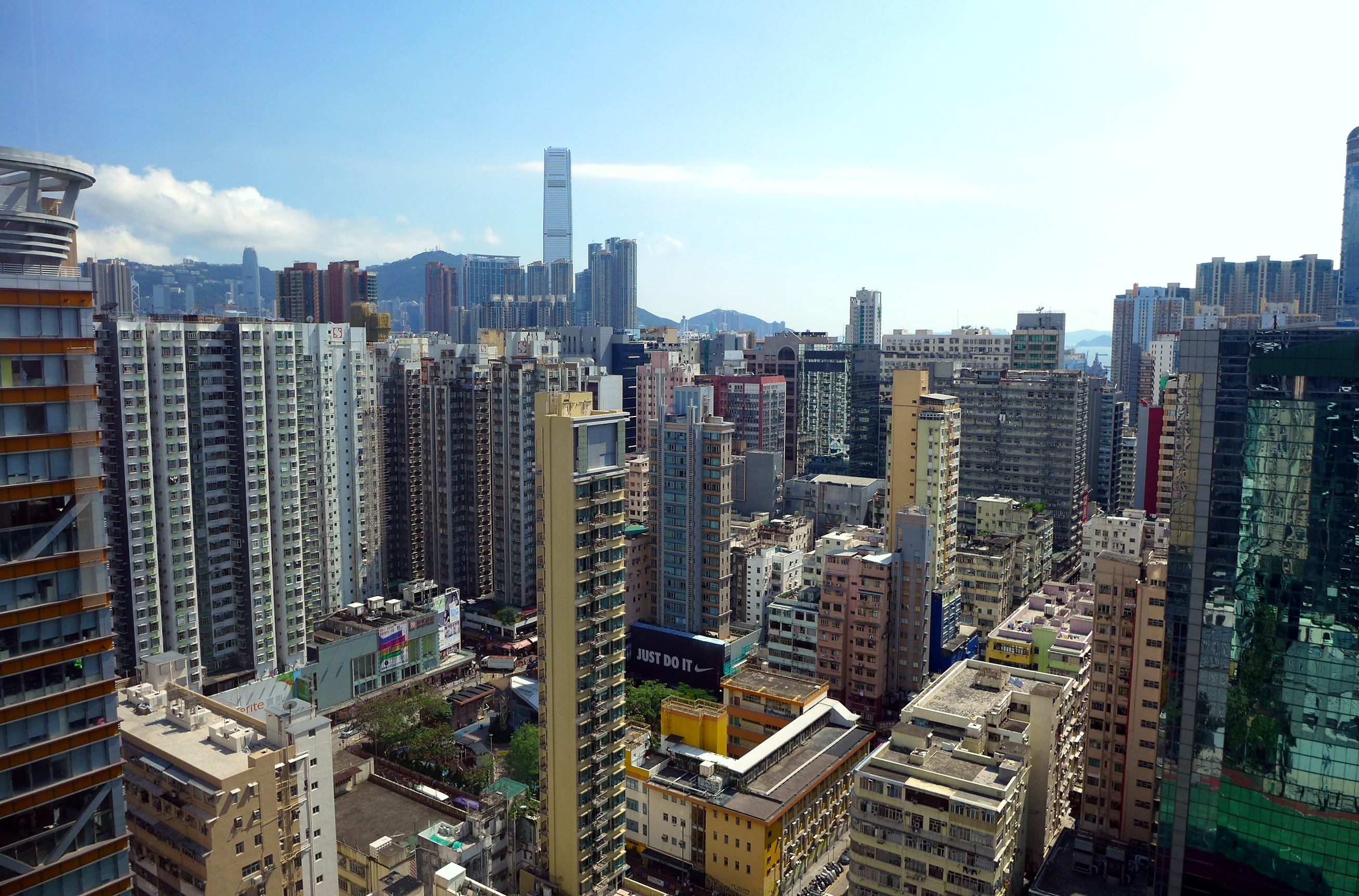 Buildings in Mong Kok